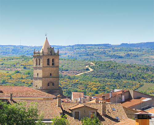 Vista de la localidad de Aldeadávila de la Ribera, en la provincia de Salamanca, Castilla y León, España